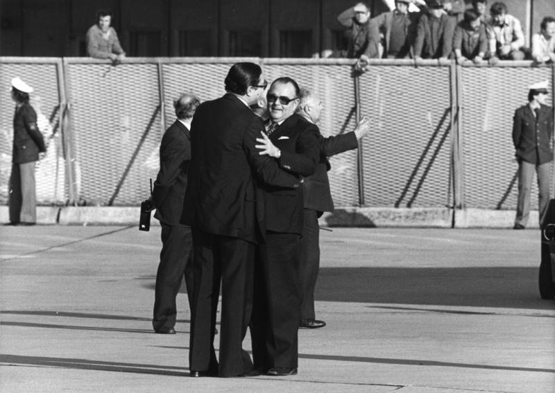 Rückkehr des Sonderflugzeuges auf dem Flughafen Köln/Bonn am 18.10.1977 mit Staatsminister Hans-Jürgen Wischnewski und der Einsatztruppe GSG 9 des Bundesgrenzschutzes nach der geglückten Befreiung der Geiseln aus einem von Terroristen gekaperten Lufthansa-Flugzeug auf dem Flughafen Mogadischu (Somalia). Bundesminister Werner Maihofer begrüßt Staatsminister Hans-Jürgen Wischnewski nach Verlassen der Sondermaschine.